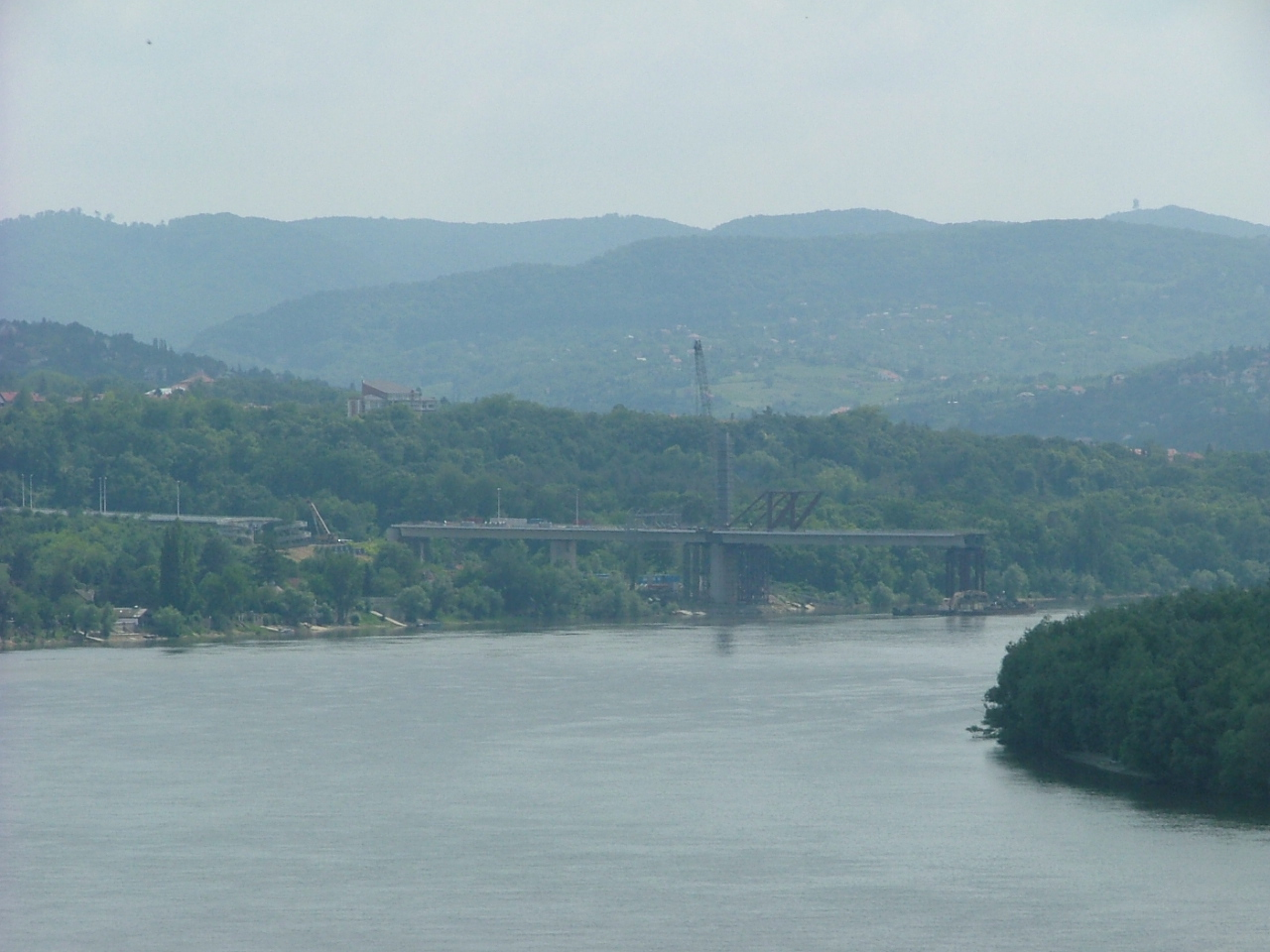 A lerombolt hidak újjáépítése Újvidéken (Szerbia)